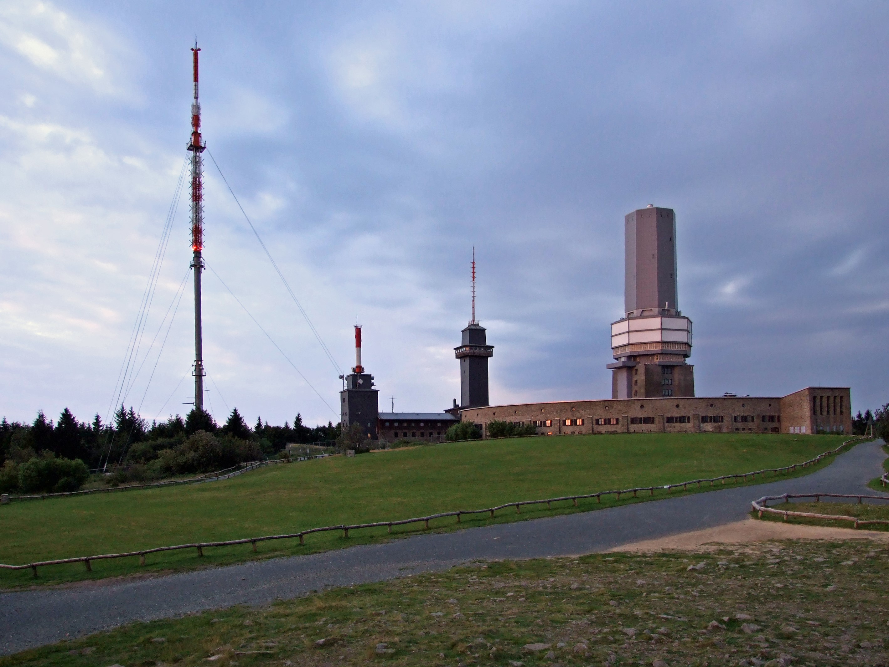 Plateu des Grossen Feldberges im Taunus